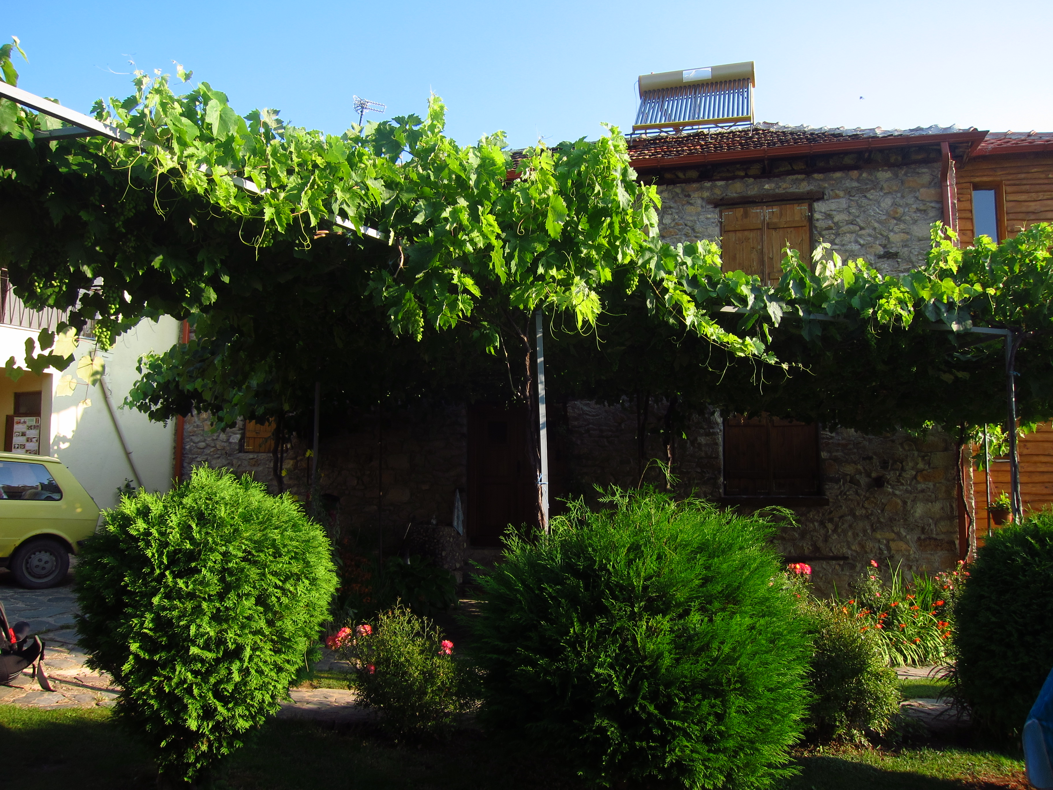 Trellis @ Villa Dihovo